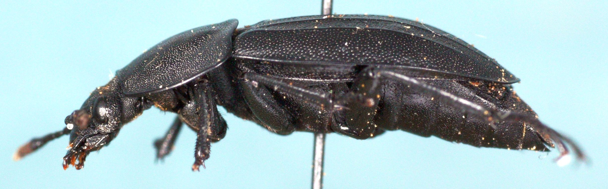 åtselbille